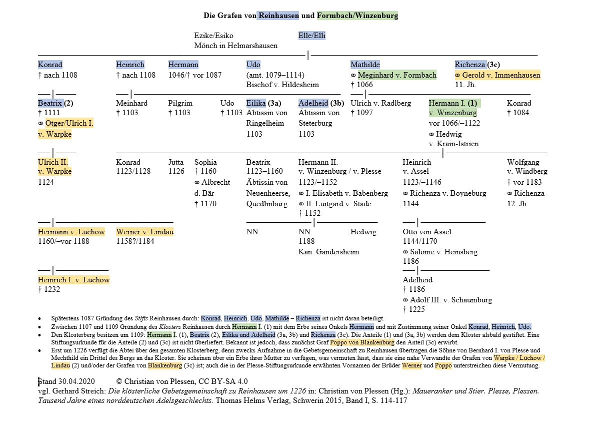 Stammtafel